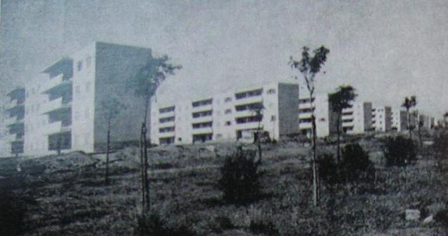 Vista del Barrio 17 de Octubre (también conocido como Barrio Grafa). Es un conjunto de monoblocks de vivienda en el barrio de Villa Pueyrredón, construido durante la presidencia de Juan Domingo Perón. Posteriormente su nombre fue cambiado por Barrio General José de San Martín.